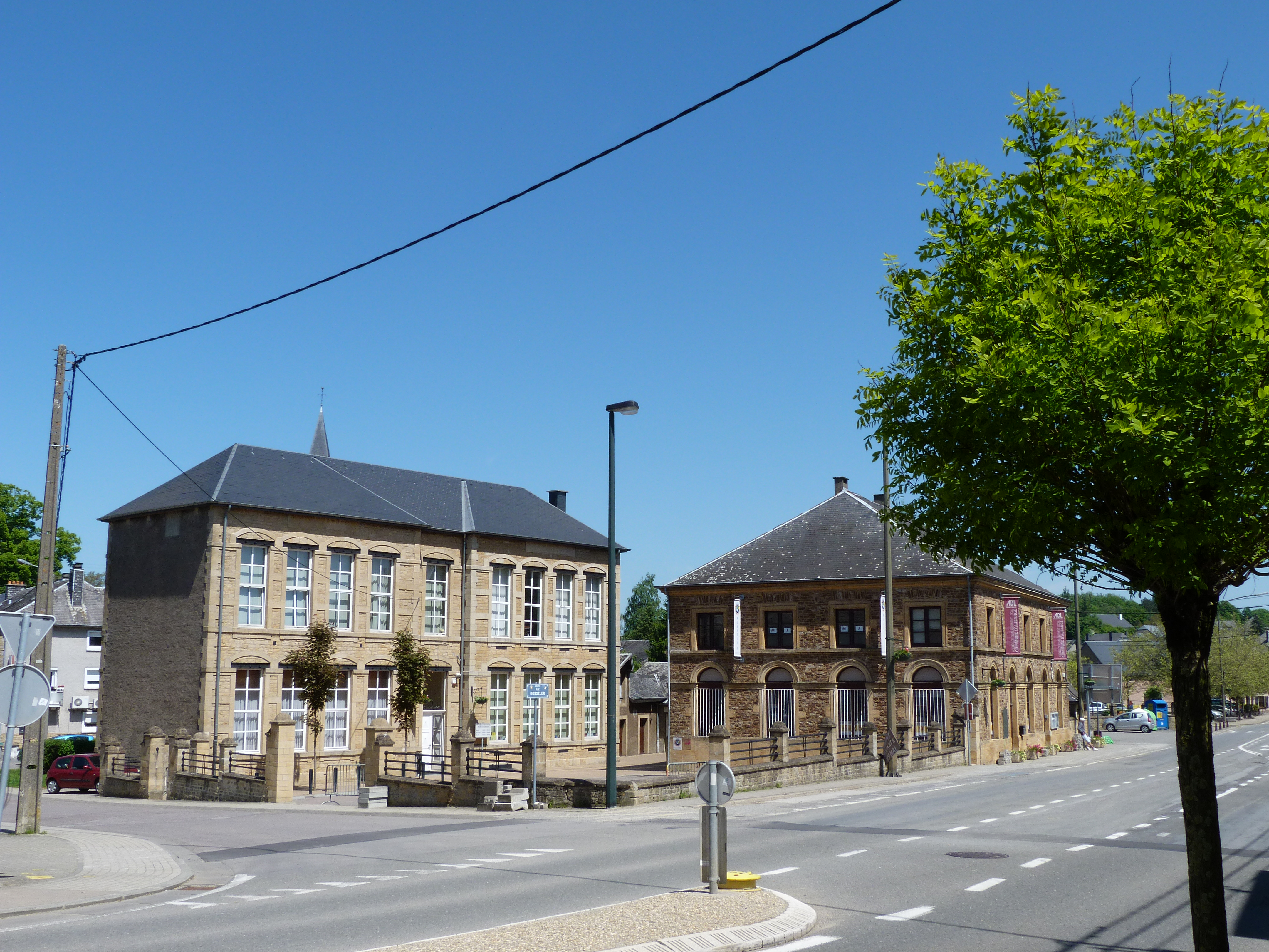 L'ancien CPAS et Hôtel de ville d'Aubange (avant 1977), aujourd'hui (2013) devenue bibliothèque et siège de l'Agence de Développement Local.